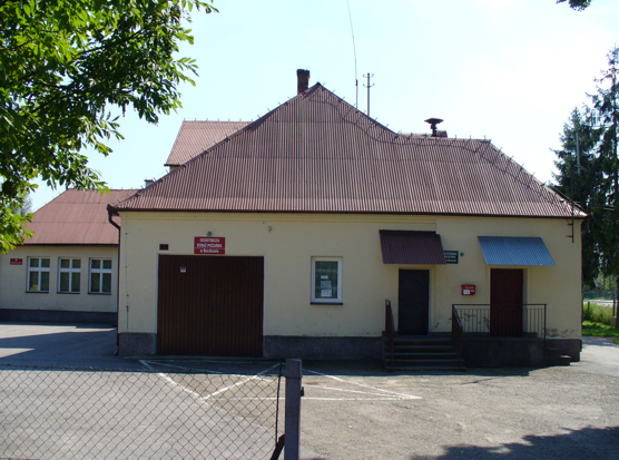 Baczków, budynek Ochotniczej Straży Pożarnej i biblioteki publicznej